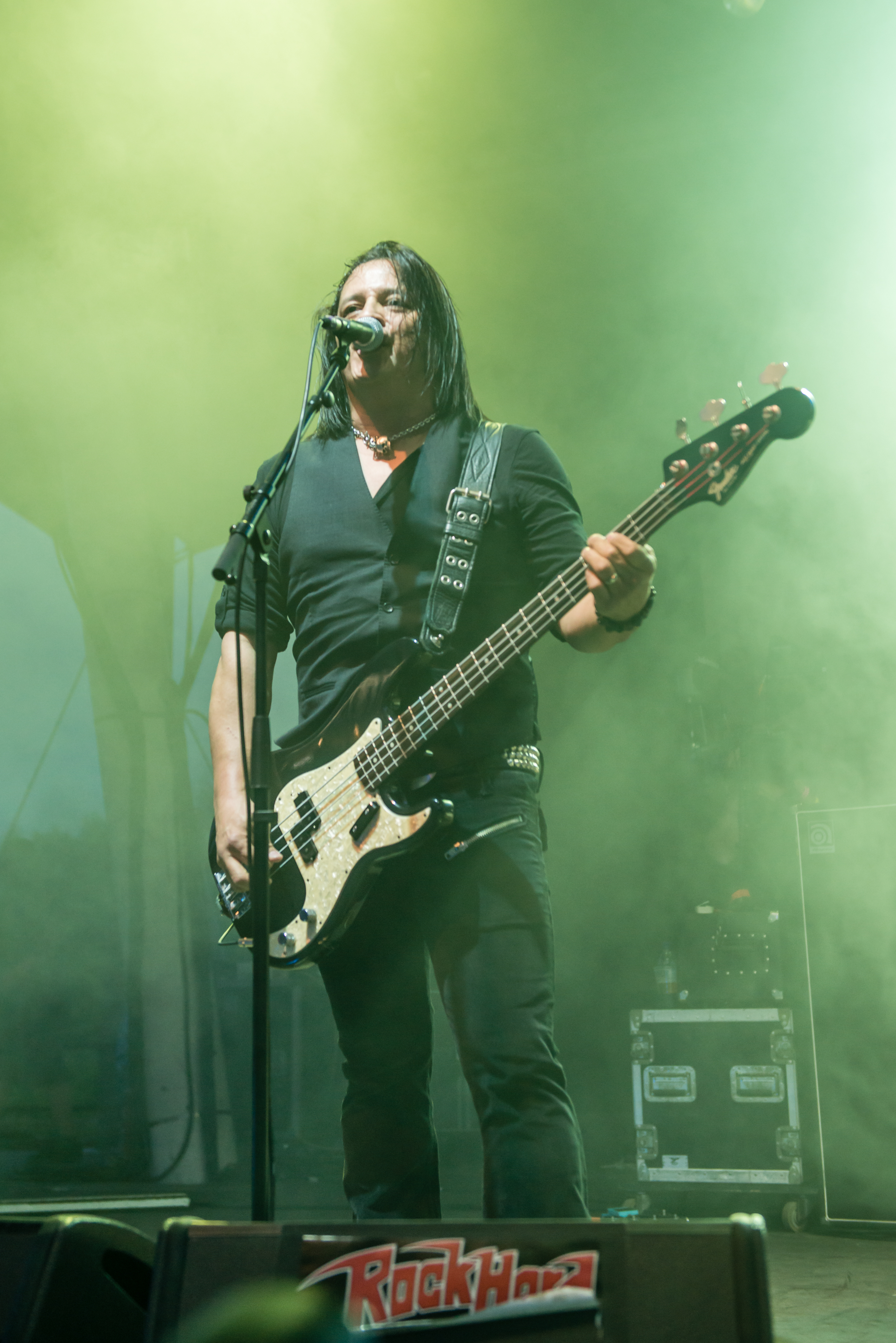 'Rock Hard Festival 2015; Gelsenkirchen Amphitheater': 'Black Star Riders'